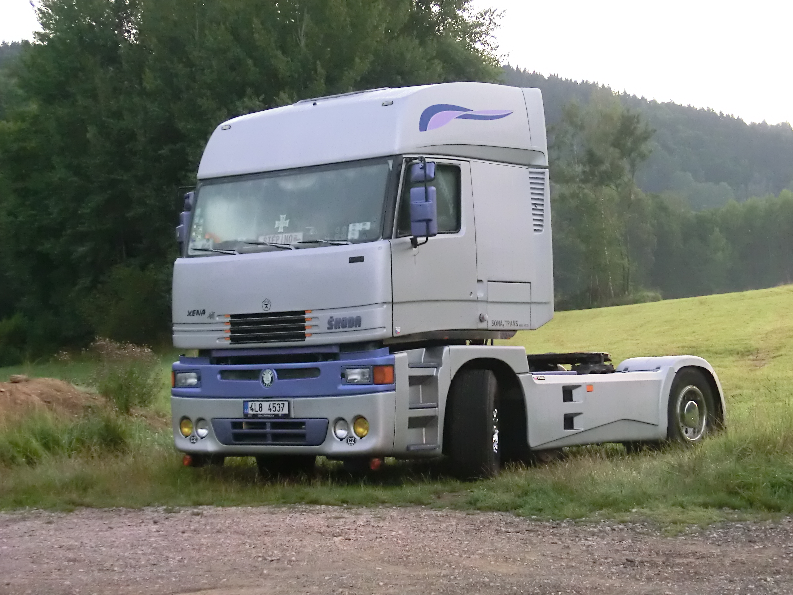 Návěsový tahač Škoda Xena (typová řada LIAZ 400), typové označení 19.47 TBV. Dopravce pan Chlum, Dolní Sytová.